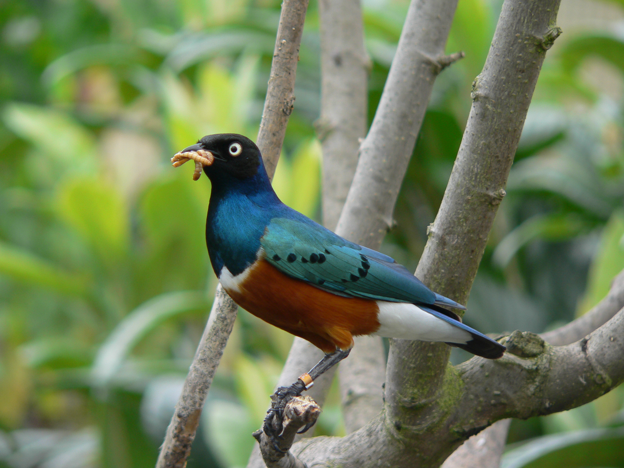 Dreifarben-Glanzstar